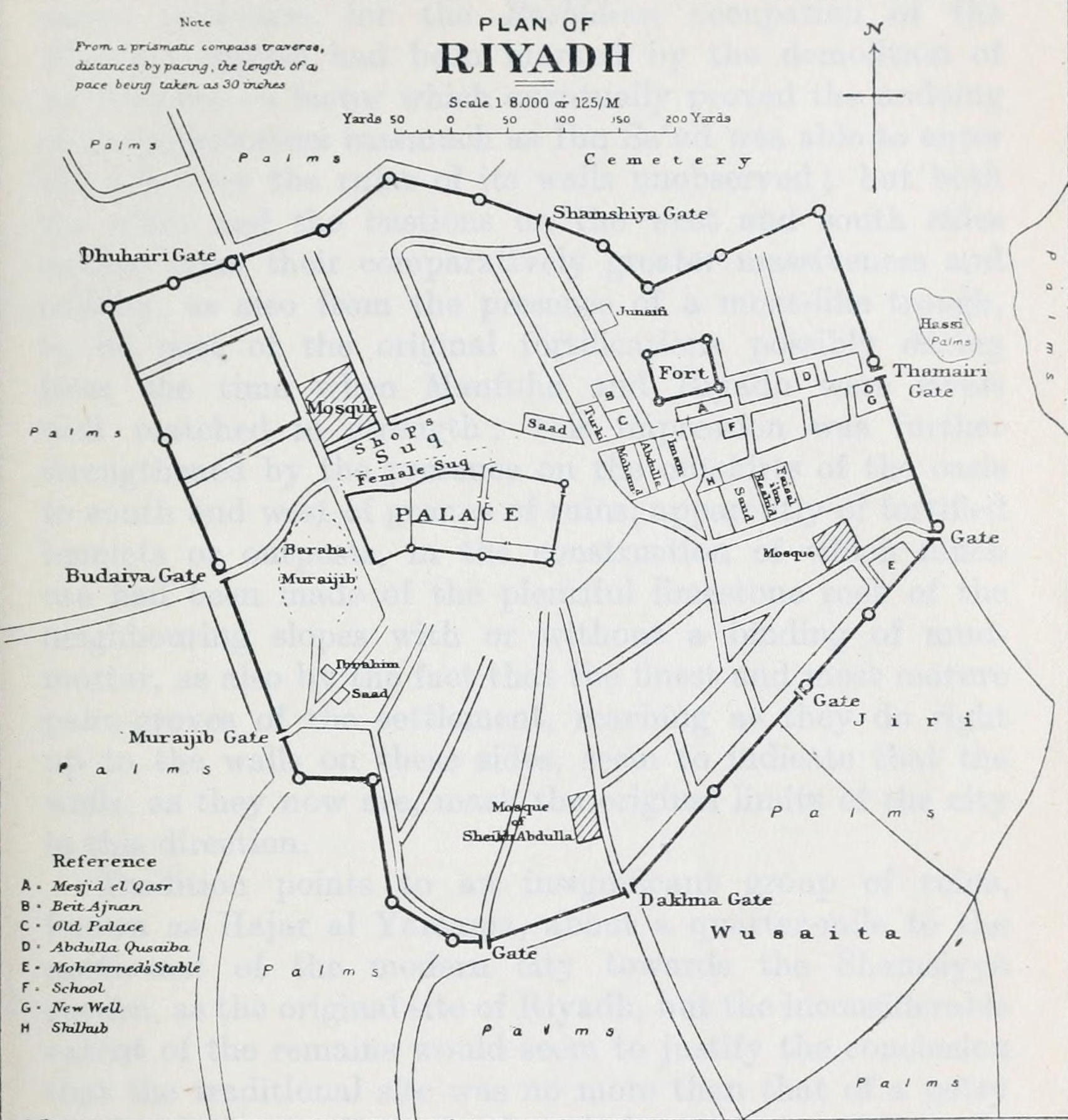 map of Riyadh